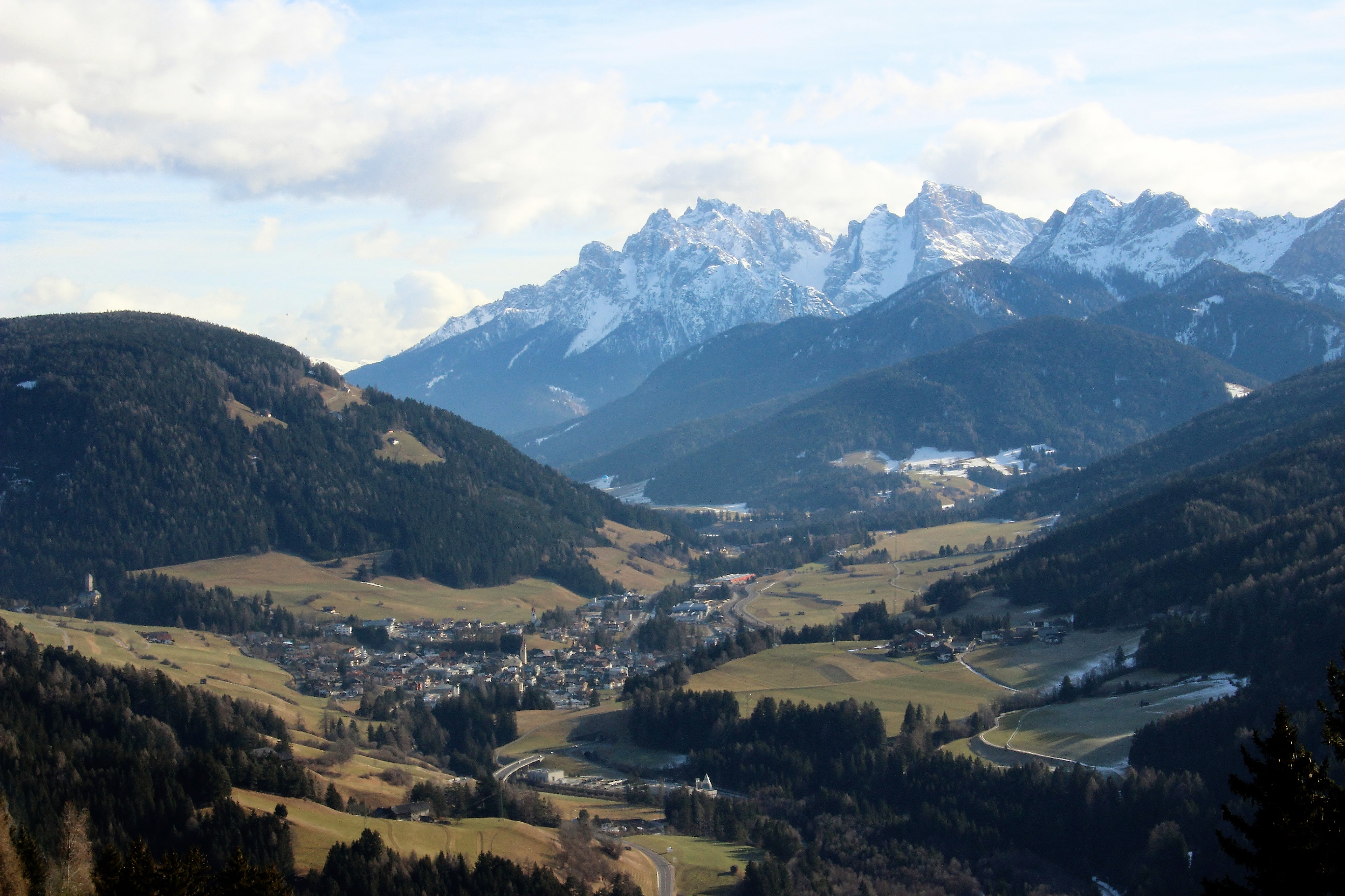 Welsberg aus Westlicher Richtung